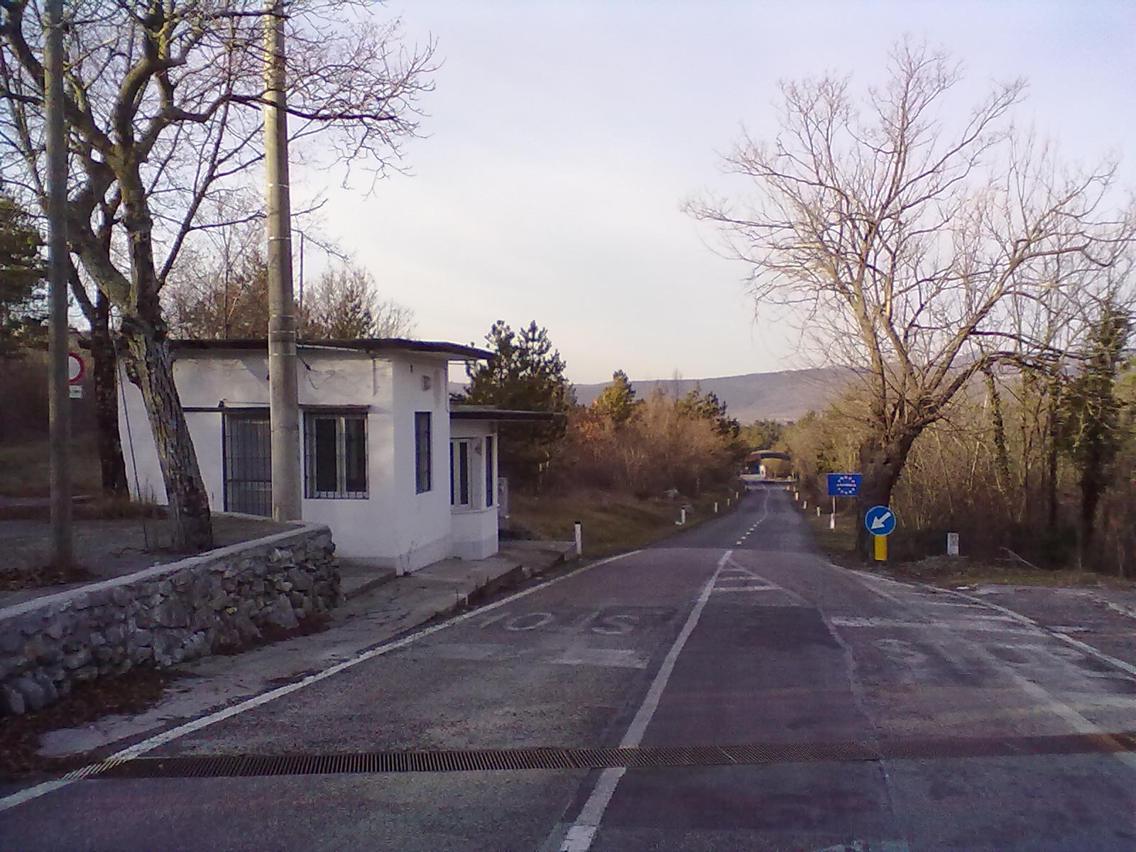 Valico di San Pelagio sulla SP6 della Provincia di Trieste